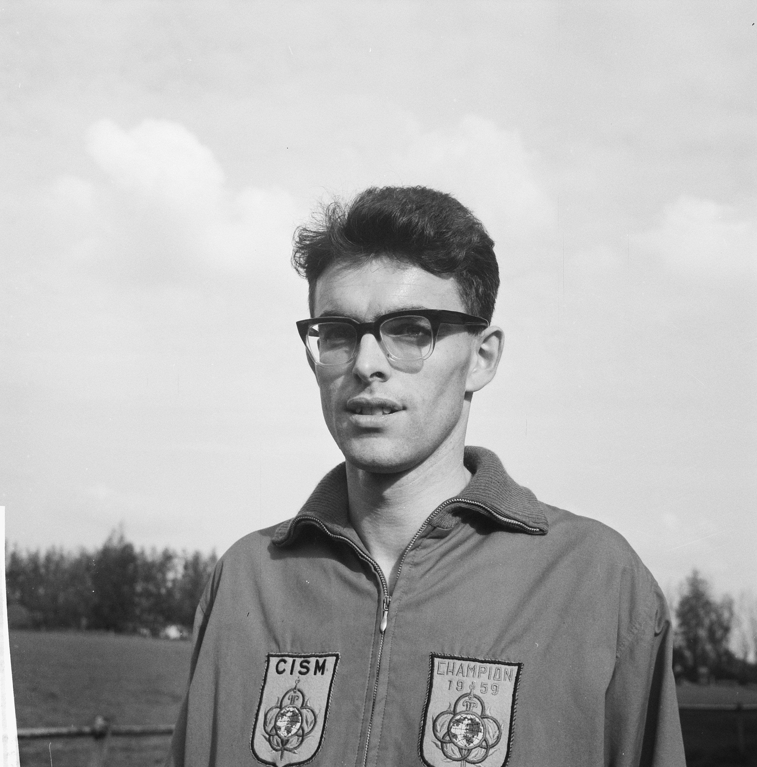 Nationale Veldloop Kampioenschappen 1961 te Gouda. Hein Cujé